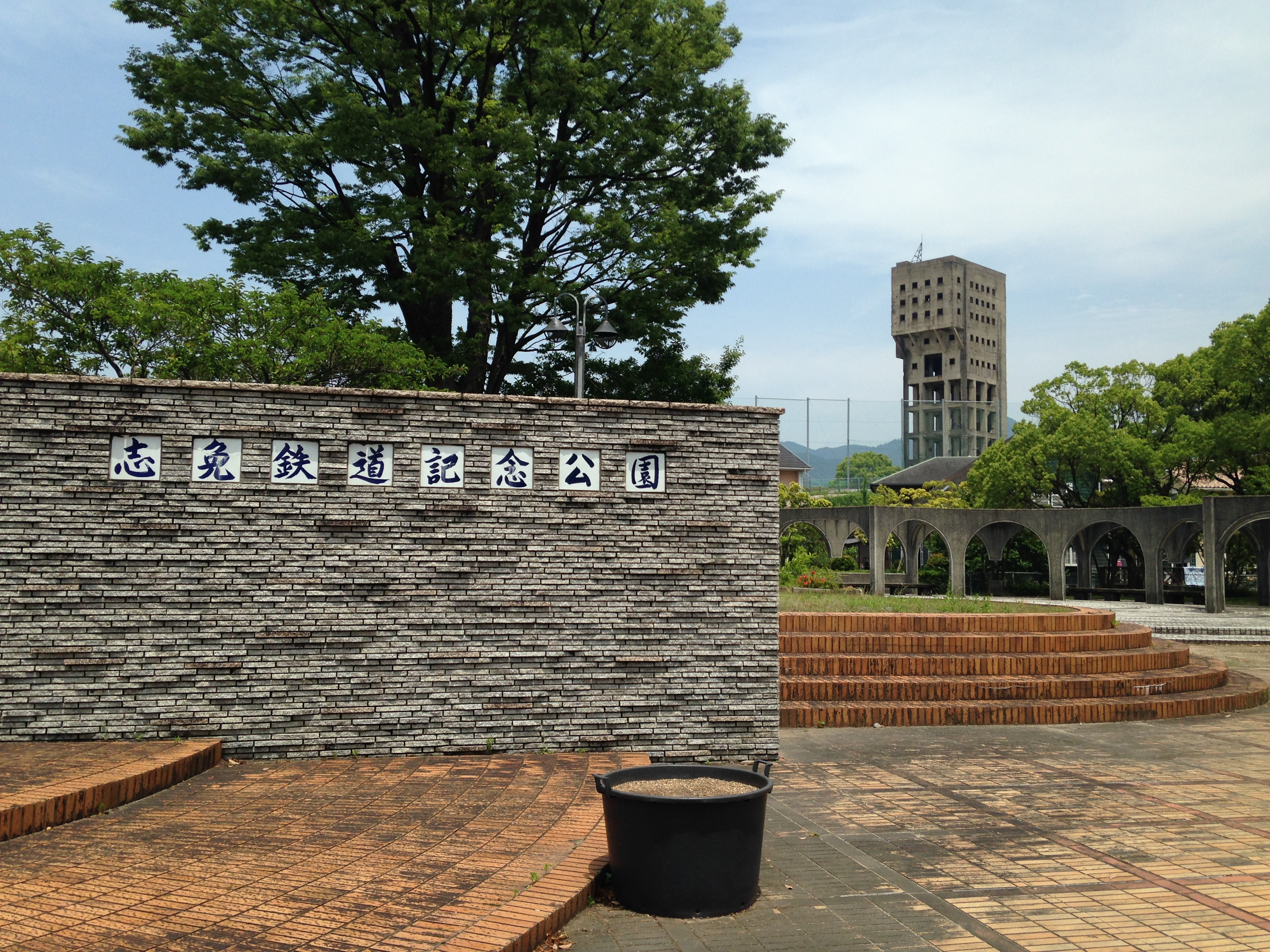 志免鉄道記念公園より望む志免鉱業所竪坑櫓